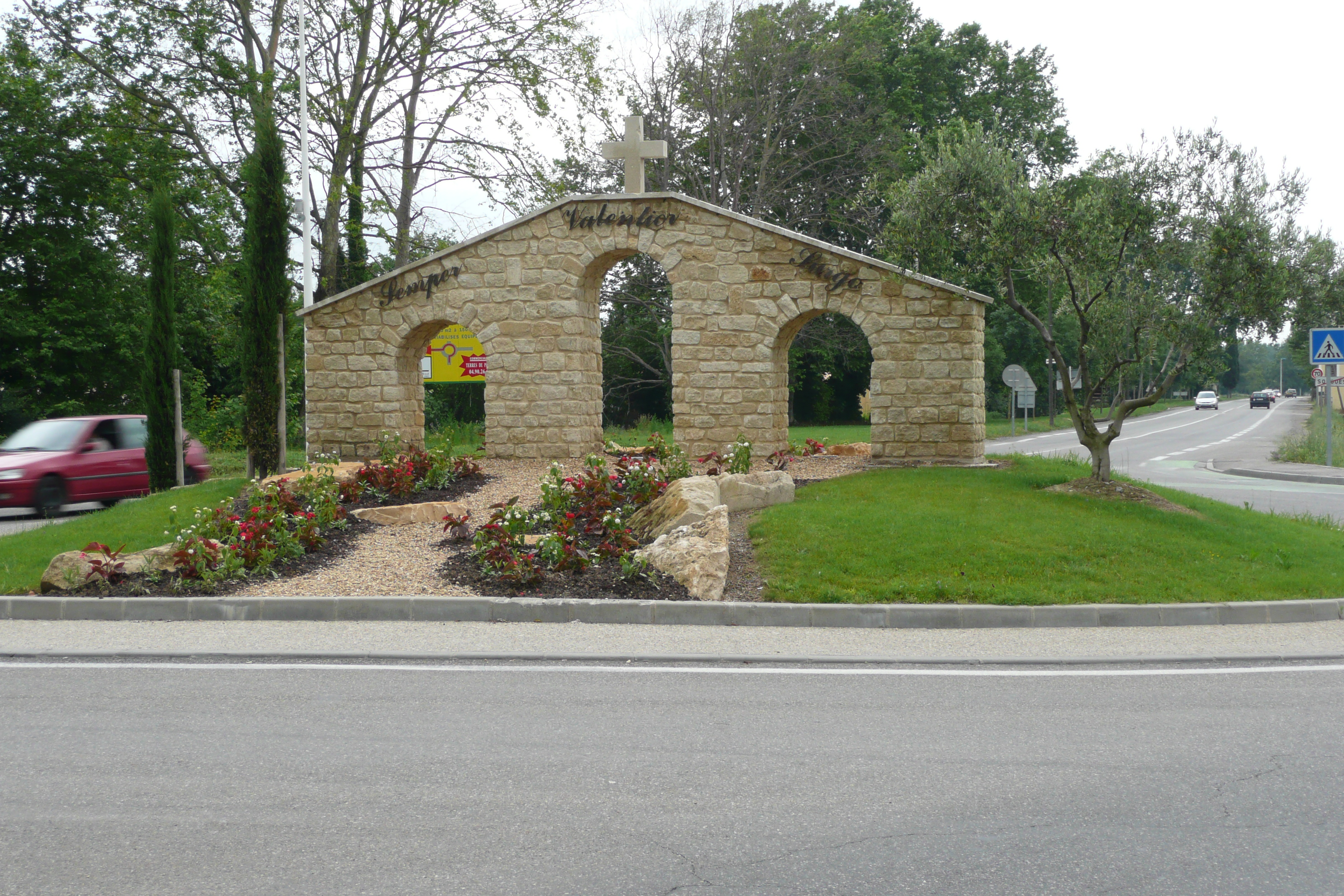 Carrefour giratoire à Sorgues (Vaucluse).